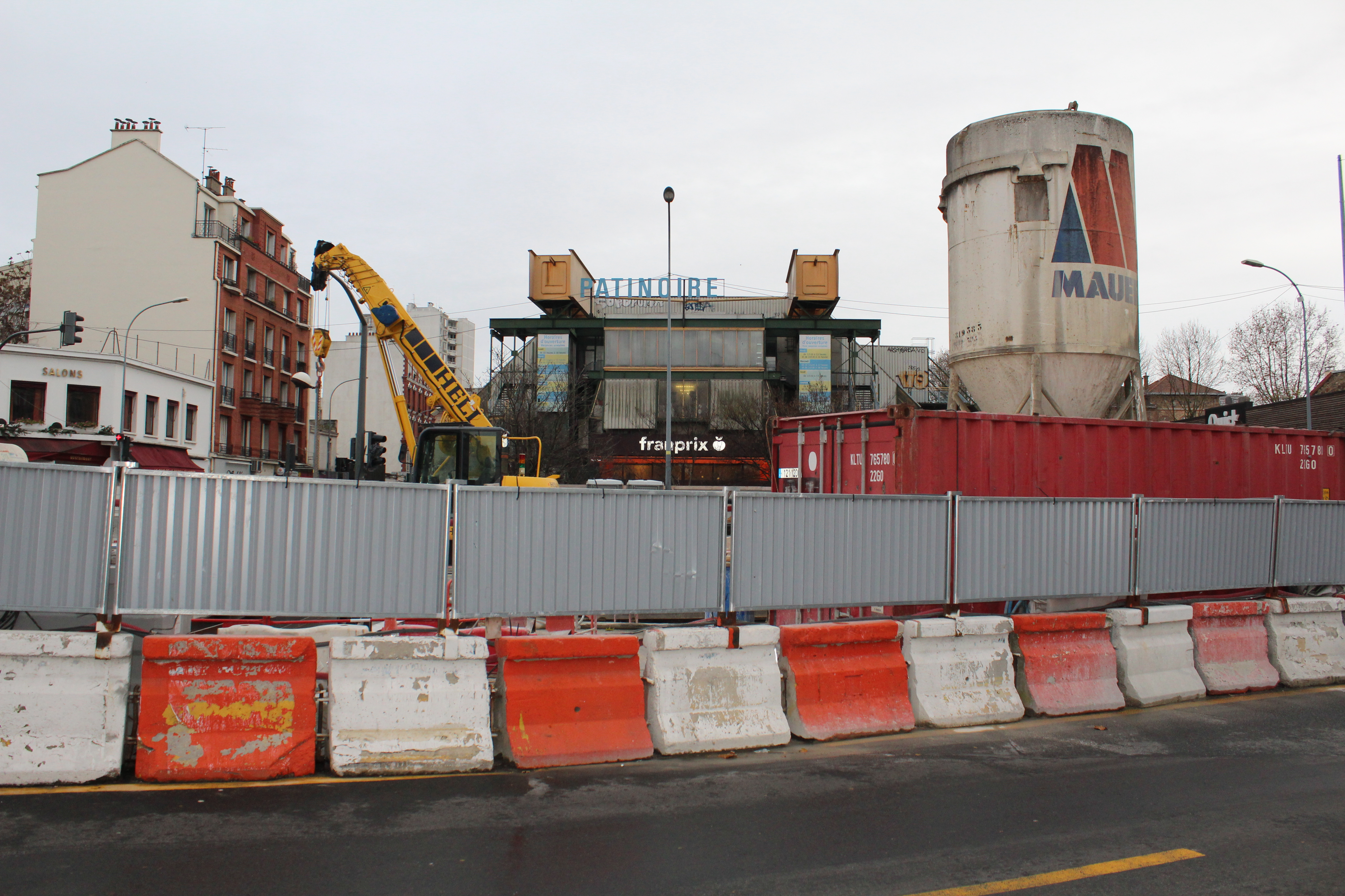 Chantier de la station de métro "Mairie de Saint-Ouen" pour l'extension de la ligne 14 du métro parisien, Saint-Ouen, Seine-Saint-Denis.